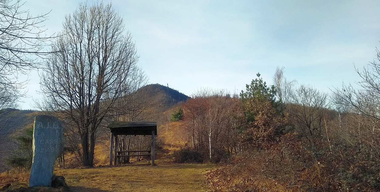 Il Monte Bernard (La Cassa / Varisella, TO) visto dalla Costa Bella (lato La Cassa)